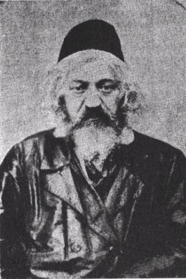 Portrait of Rabbi Yitzchak Elchanan Spektor, (1817-1896)